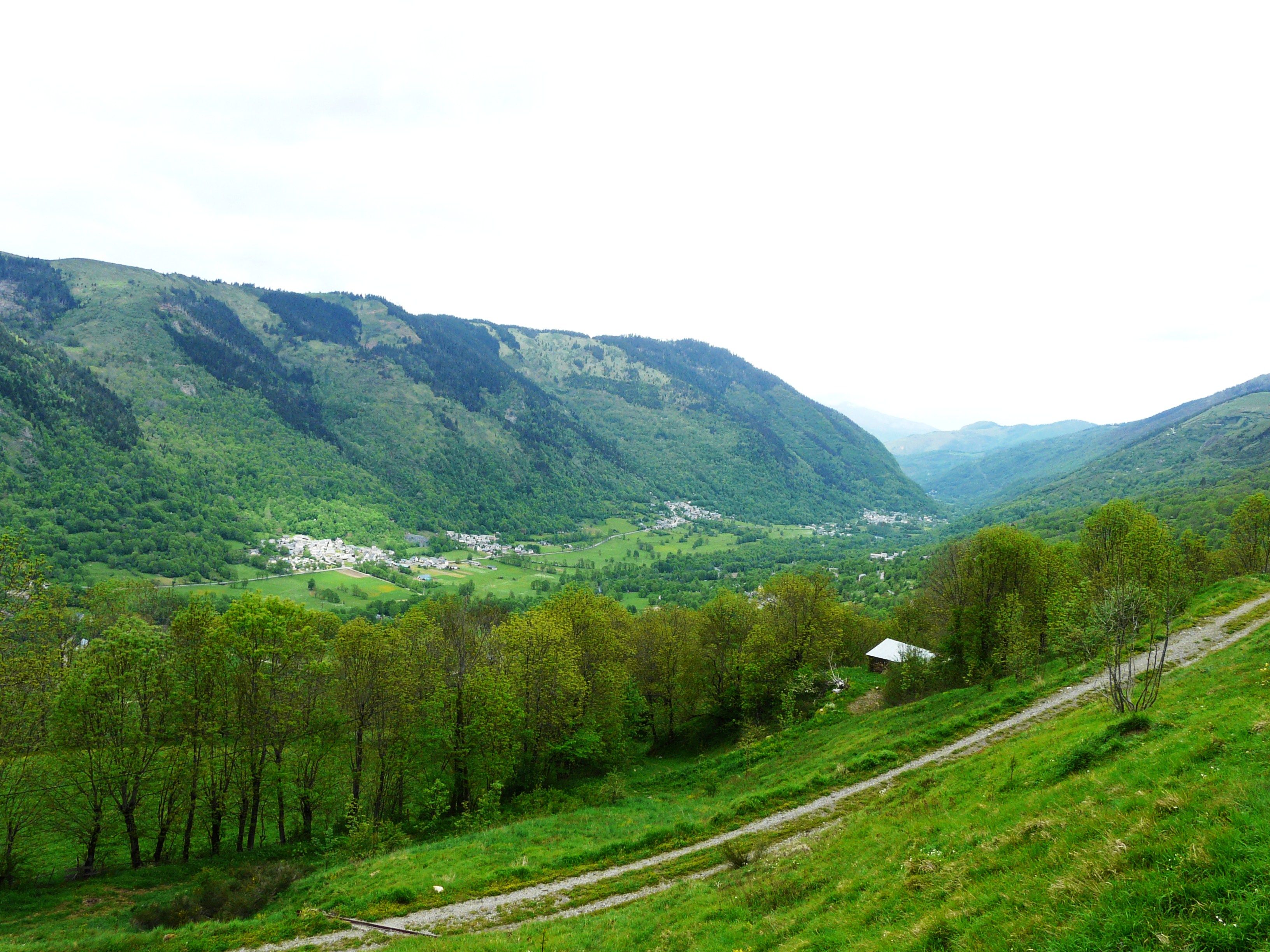 La vallée du Louron d'Adervielle-Pouchergues à Avajan, Hautes-Pyrénées, France. Vue prise depuis Loudervielle.